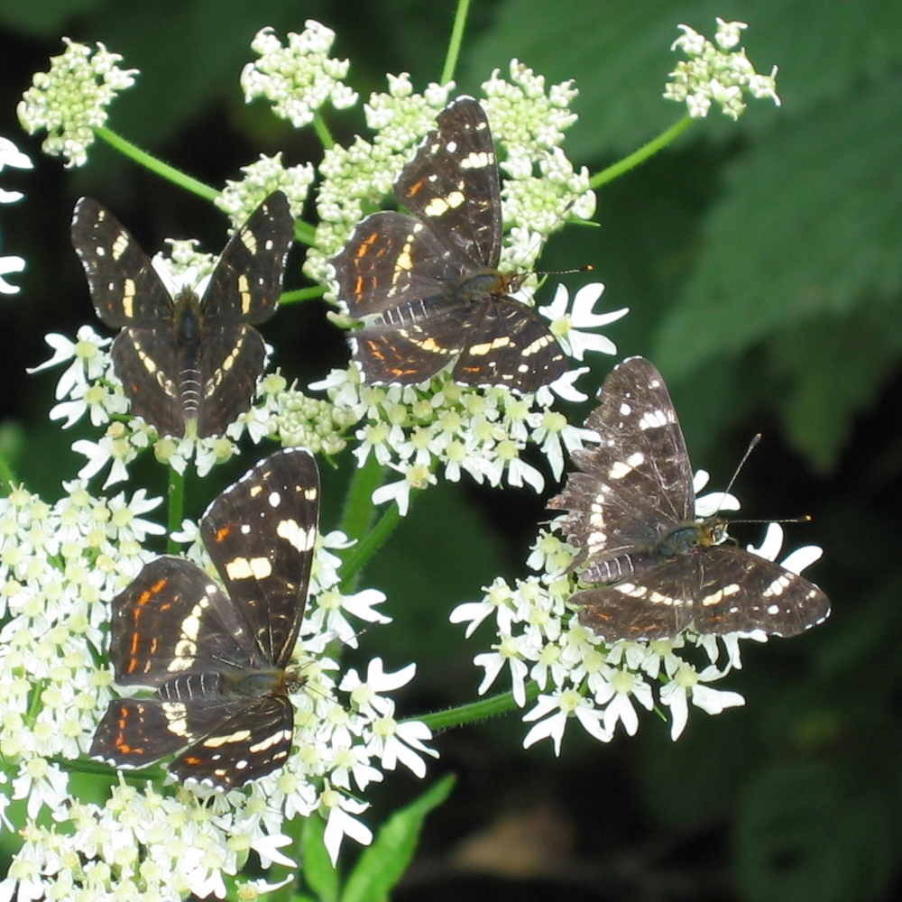 Araschnia levana